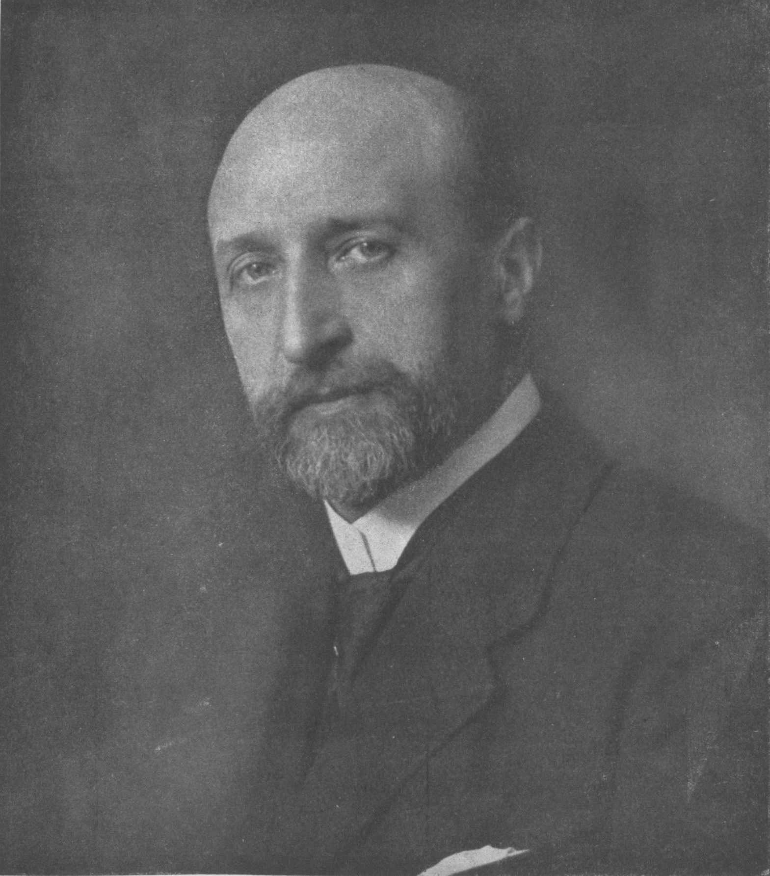 „Der neue Präsident der deutschösterreichischen Nationalversammlung. Karl Seitz, bisheriger Obmann der sozialdemokratischen Fraktion“ (Bildunterschrift) Karl Seitz (1869–1950), Austrian politician